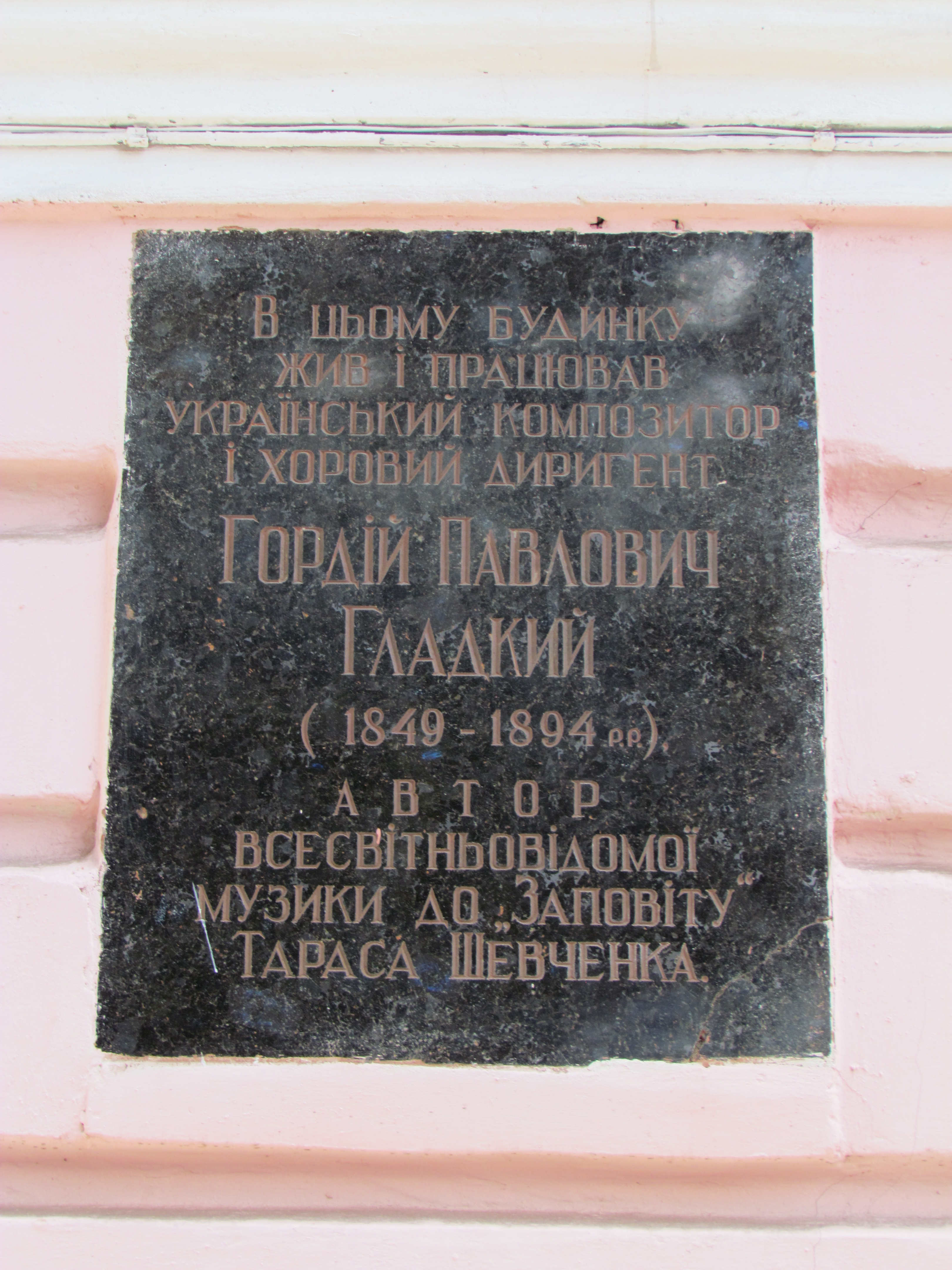 Будинок, у якому жив і працював Г.П.Гладкий, український композитор, хоровий диригент, автор музики на слова “Заповіту” Т.Г.Шевченка